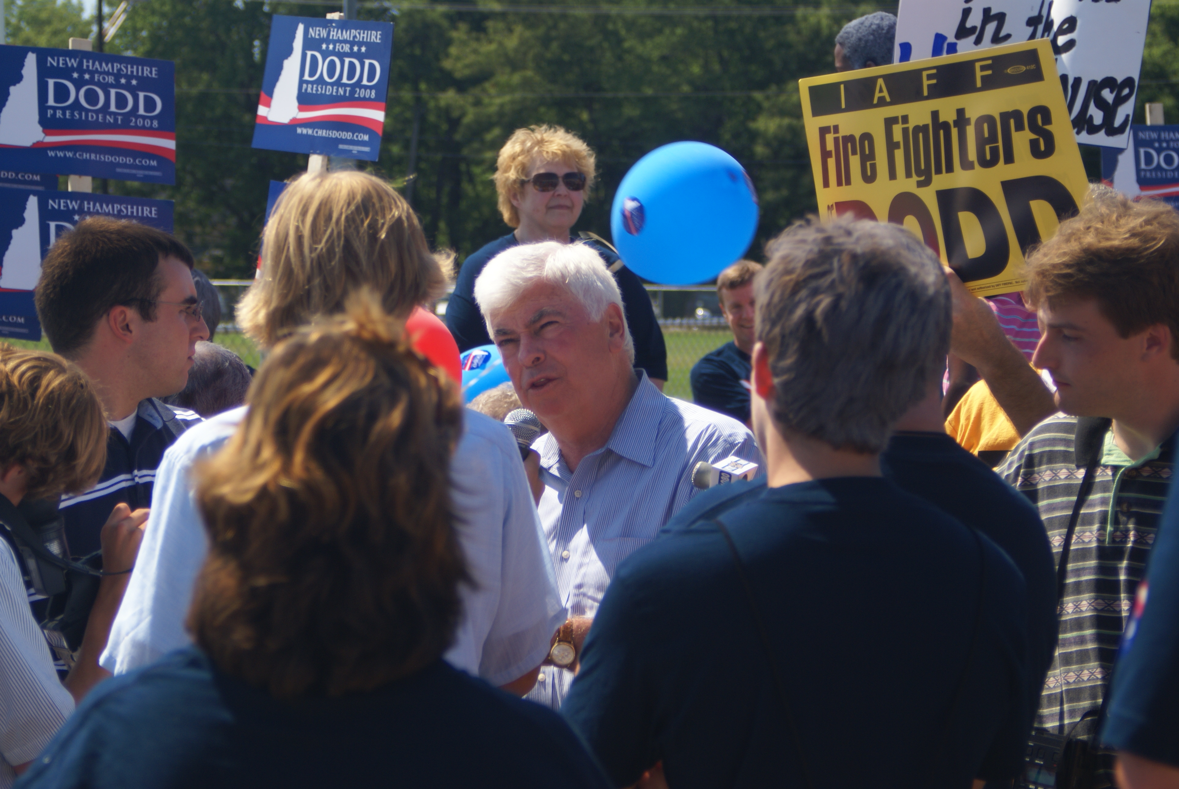 Chris Dodd